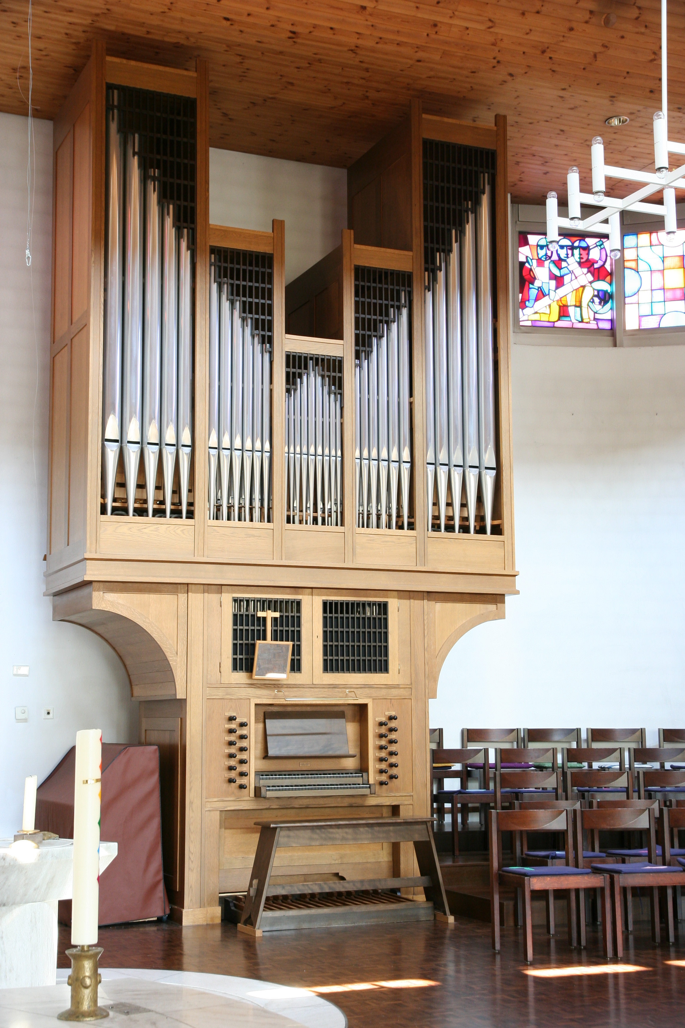 Römisch-katholische Kirche Heilige Familie Schöftland Orgel